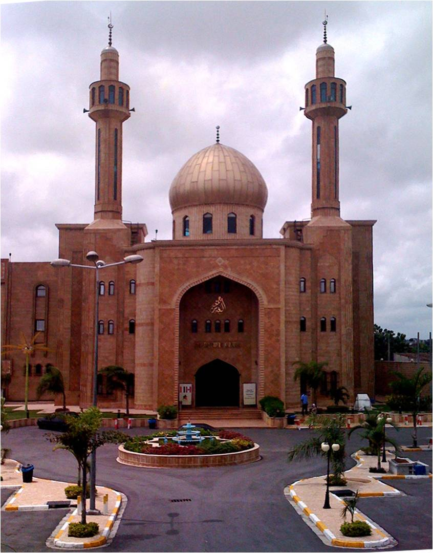 Centre culturel islamique à Marcory, Côte d'Ivoire